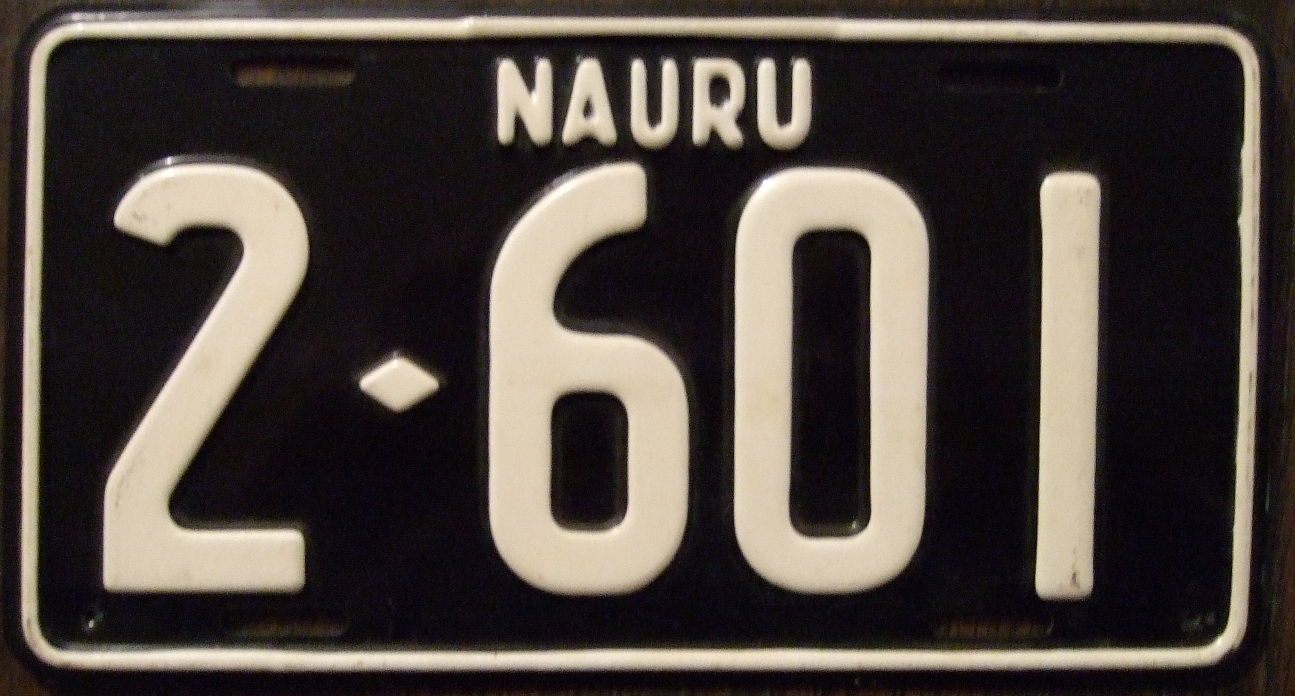 NAURU 1970's passenger